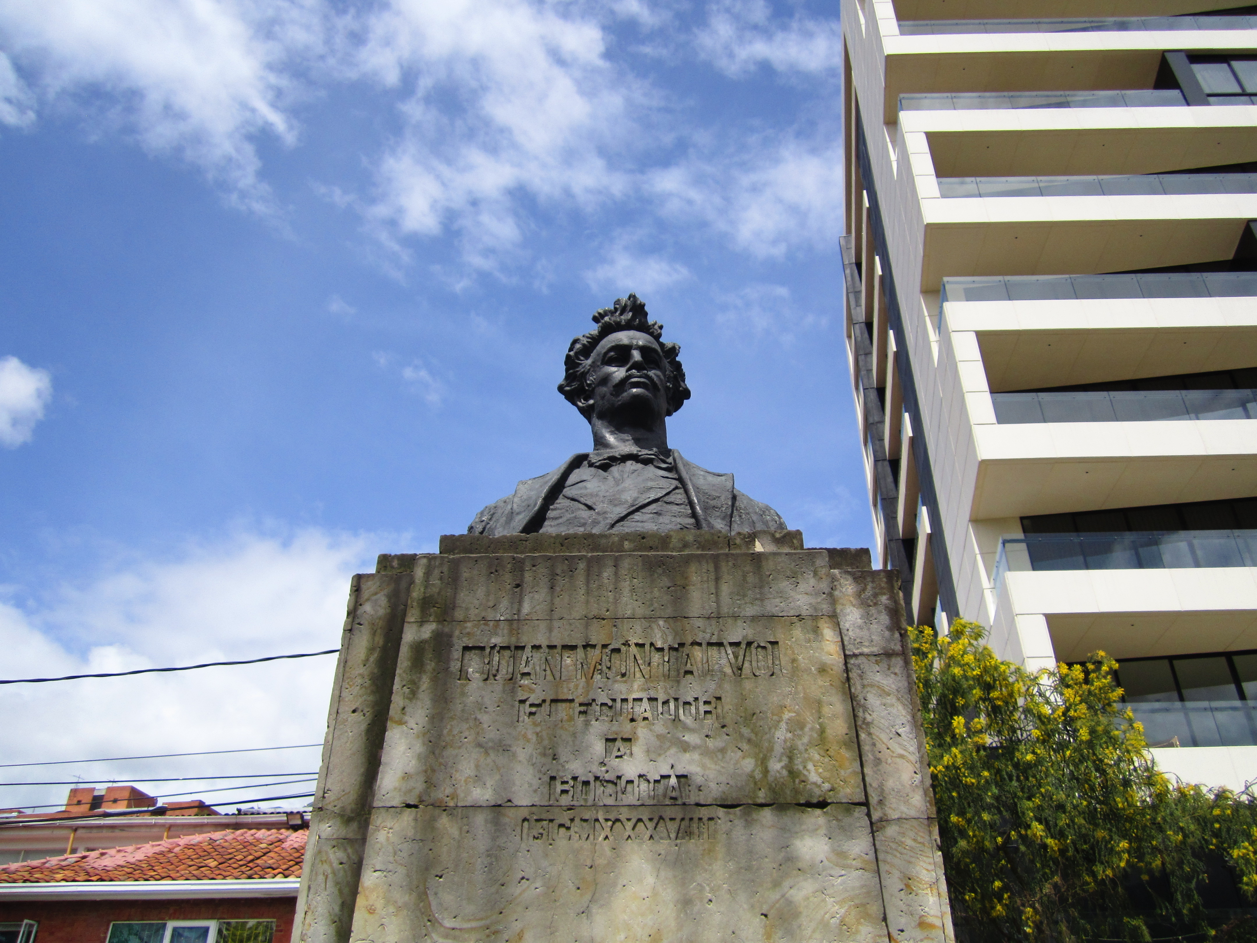 Bogota, busto del poeta ecuatoriano Juan Montalvo.